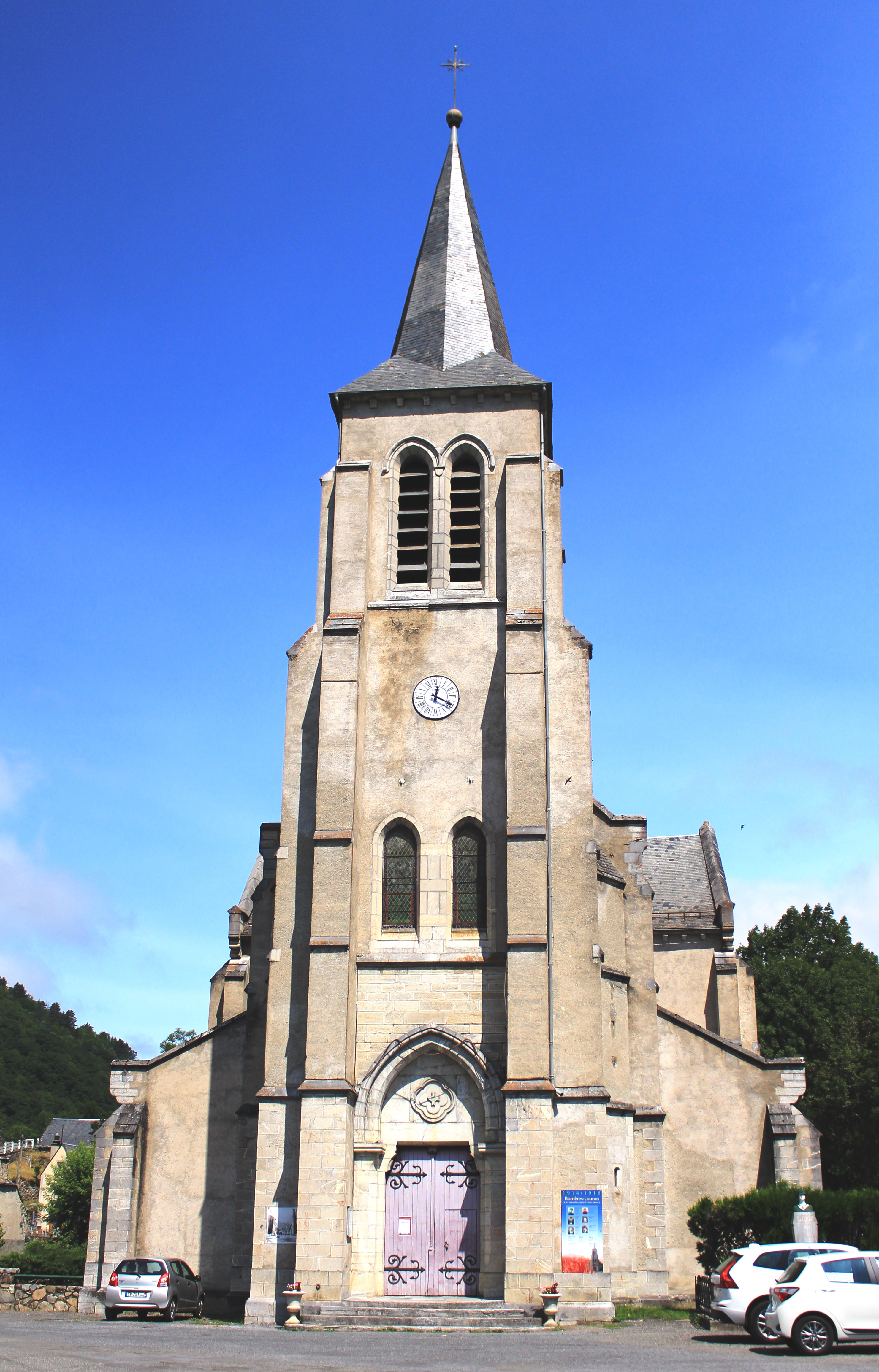 Église Notre-Dame-de-l'Assomption de Bordères-Louron (Hautes-Pyrénées)